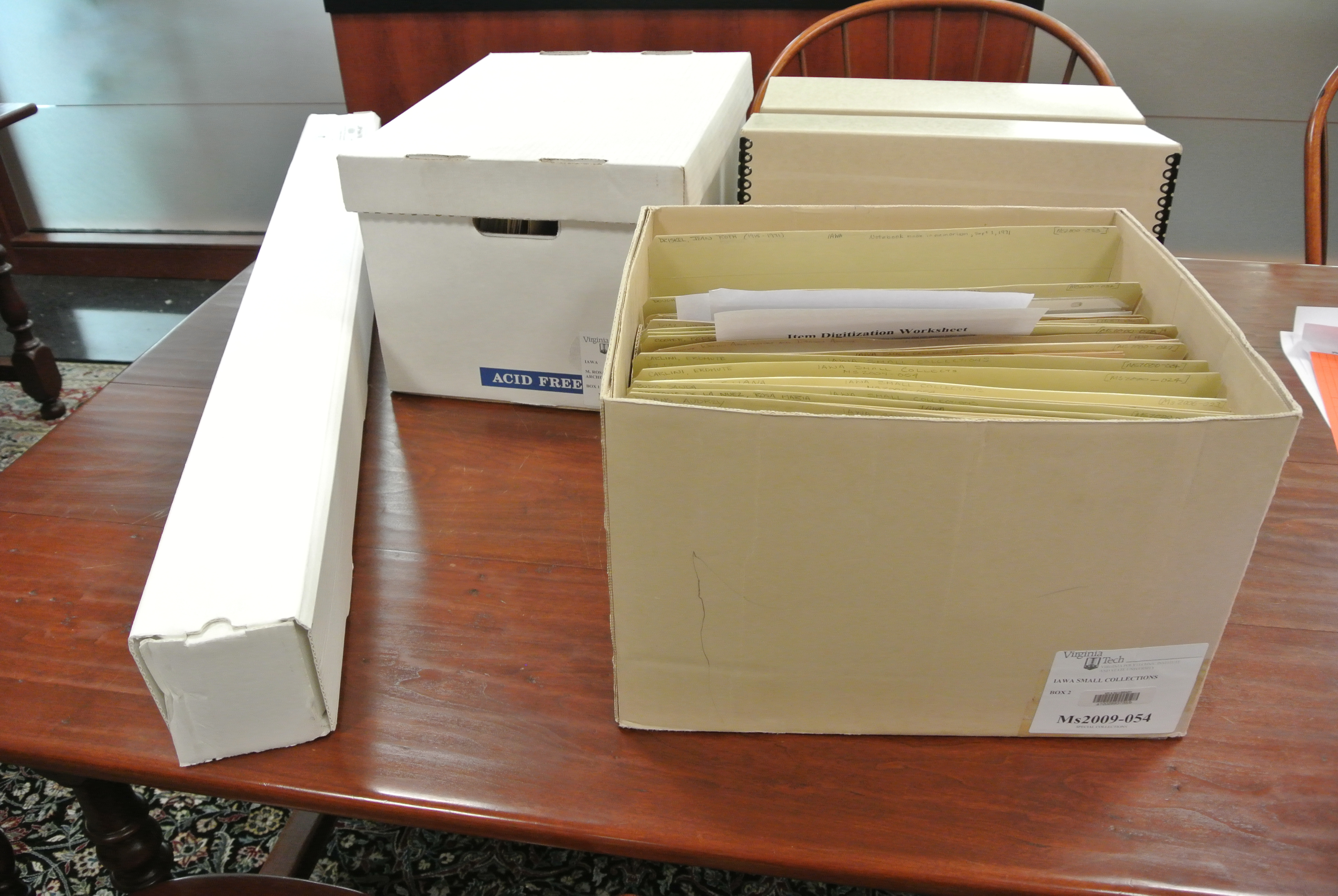 Fotos en el Archivo Internacional de Mujeres en Arquitectura IAWA, Virginia Tech, Blacksburg, Virgina, Estados Unidos, 2016.